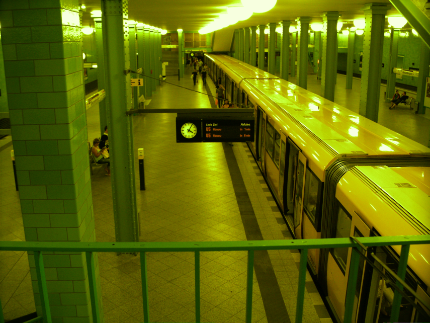 Berlin-Alexanderplatz, U-Bahnsteig der Linie 5 mit abfahrbereiter Bahn